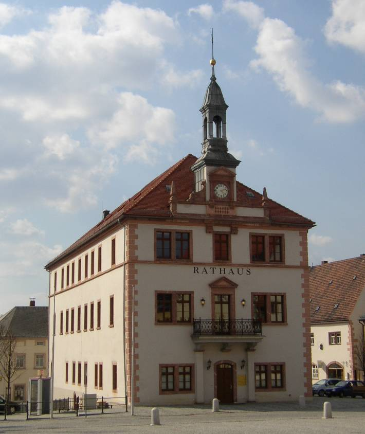 Das Geithainer Rathaus